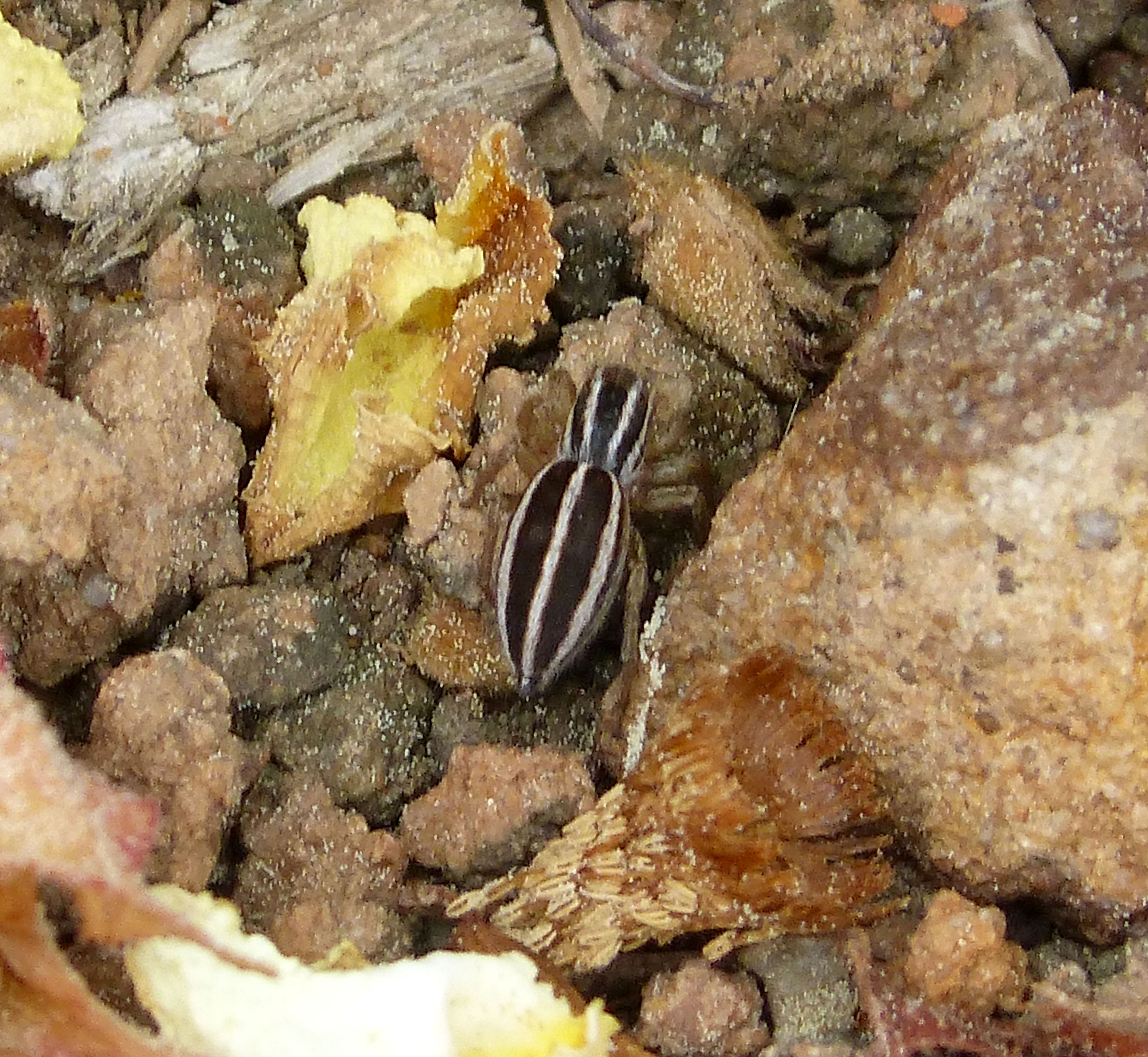 Alcornocales N.P. Andalucia, Spain